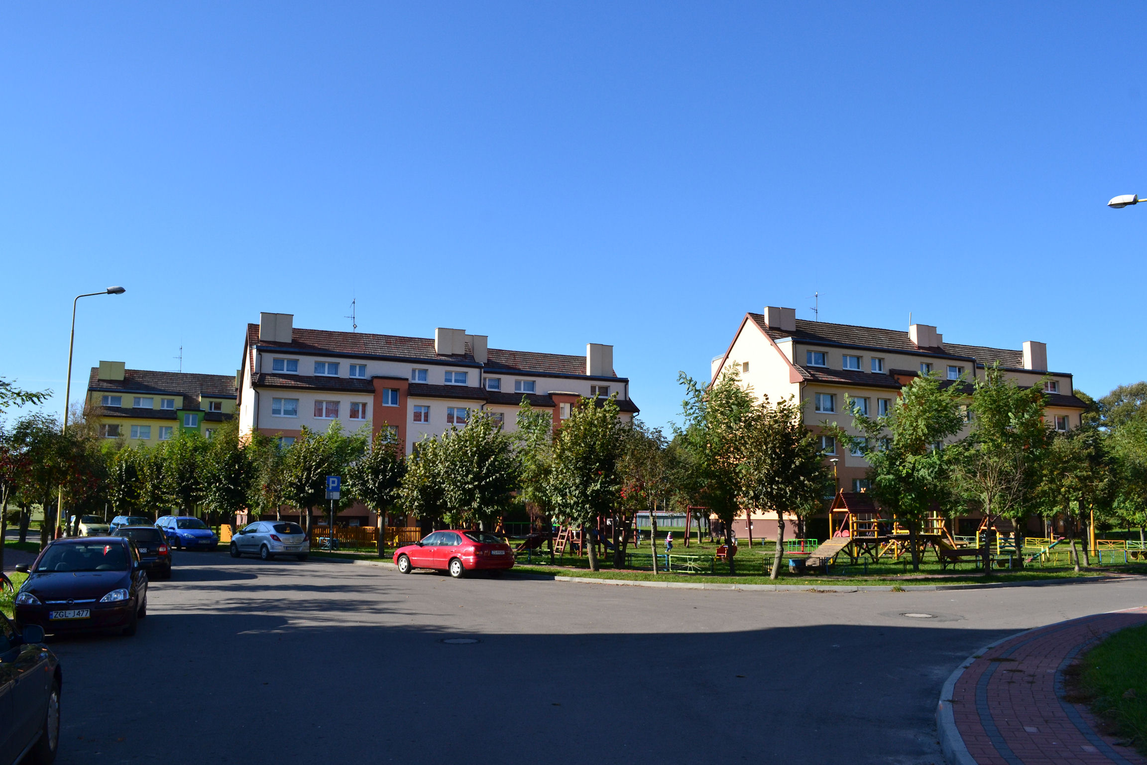 Stepnica